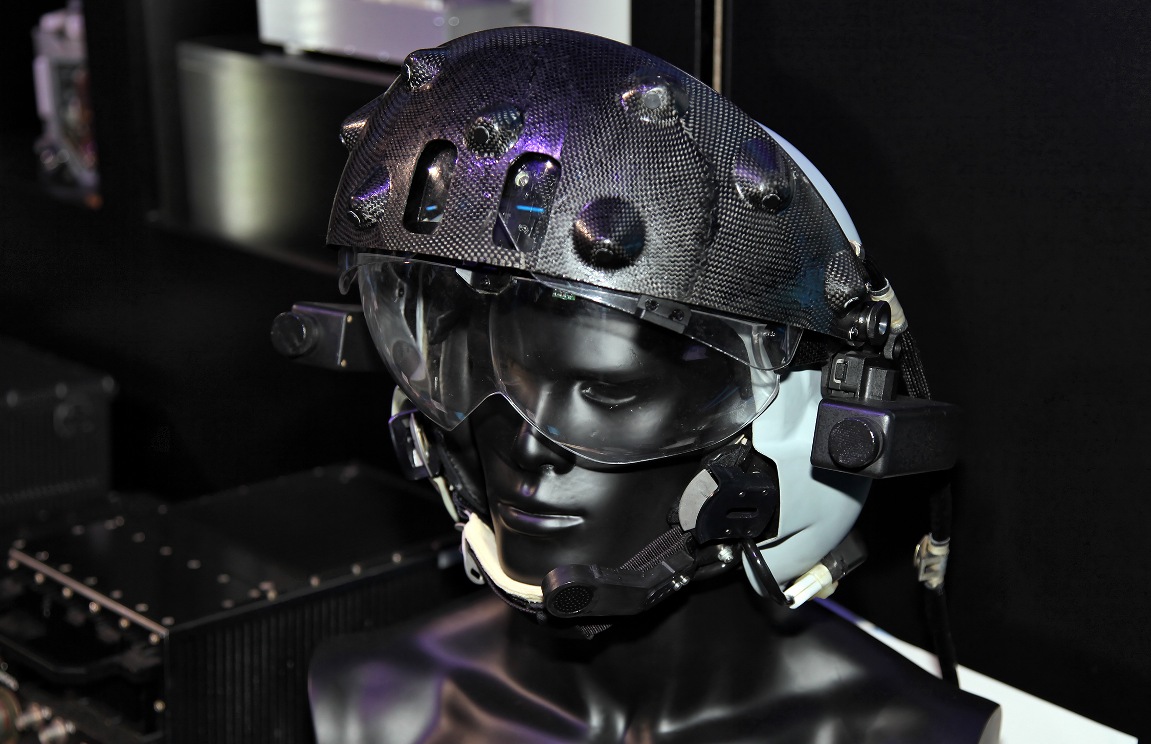 Нашлемная система целеуказания и индикации НСЦИ-В для пилота Ми-28Н (Helmet-mounted target designation and indication system NSTsI-V for Mi-28N)